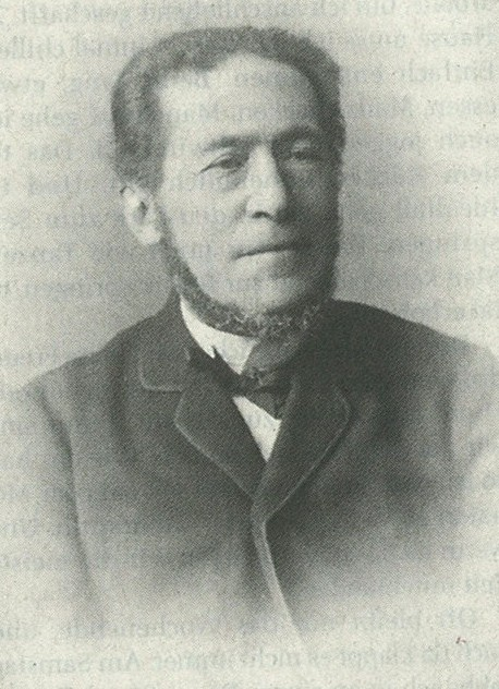 t